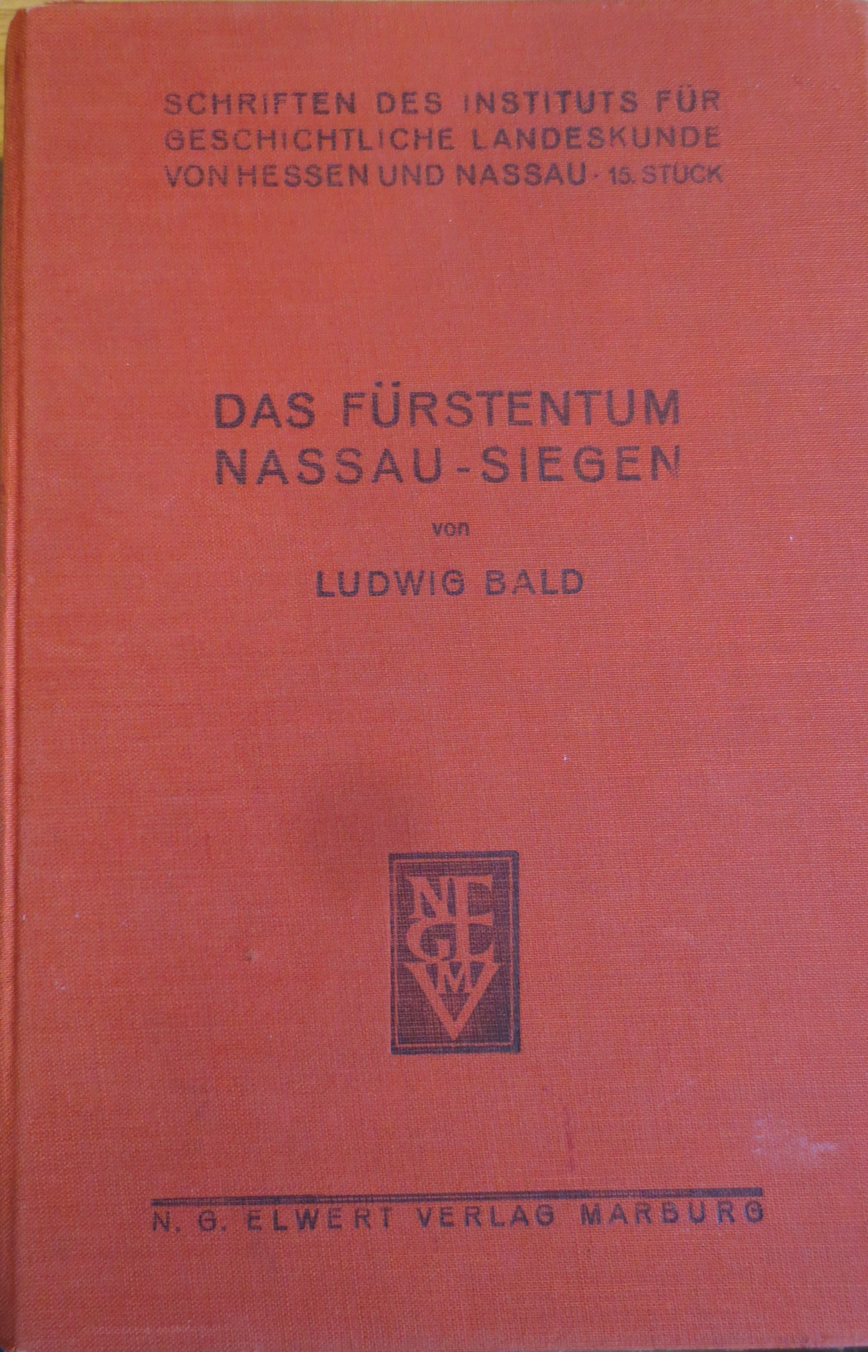 Das Fürstentum Nassau-Siegen